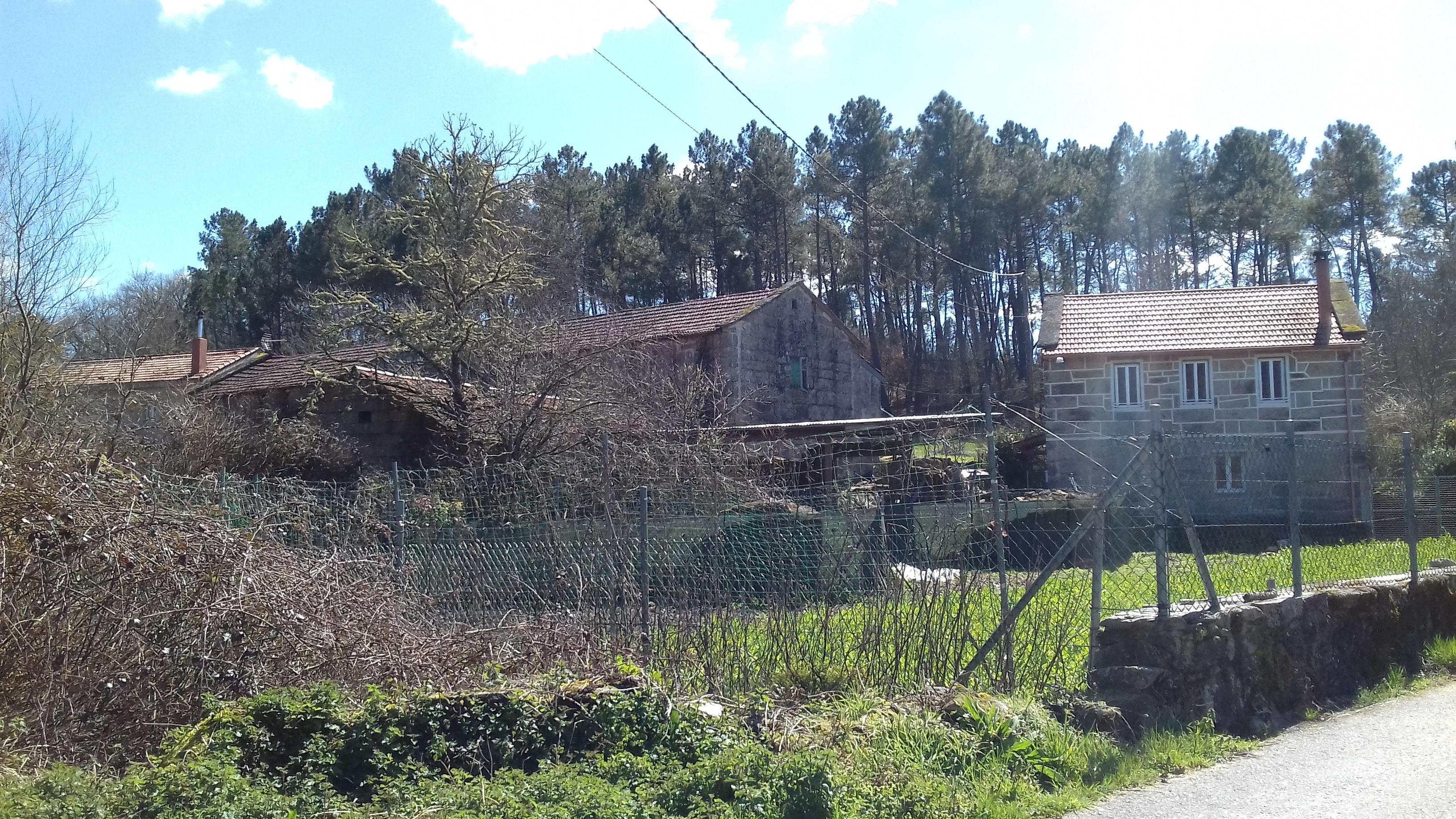 O Tellado do Campo, O Irixo